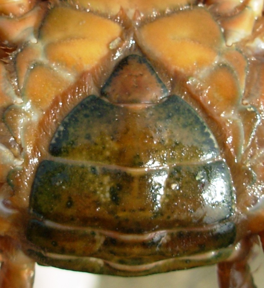 Carcinus maenas. Abdomen de femelle.